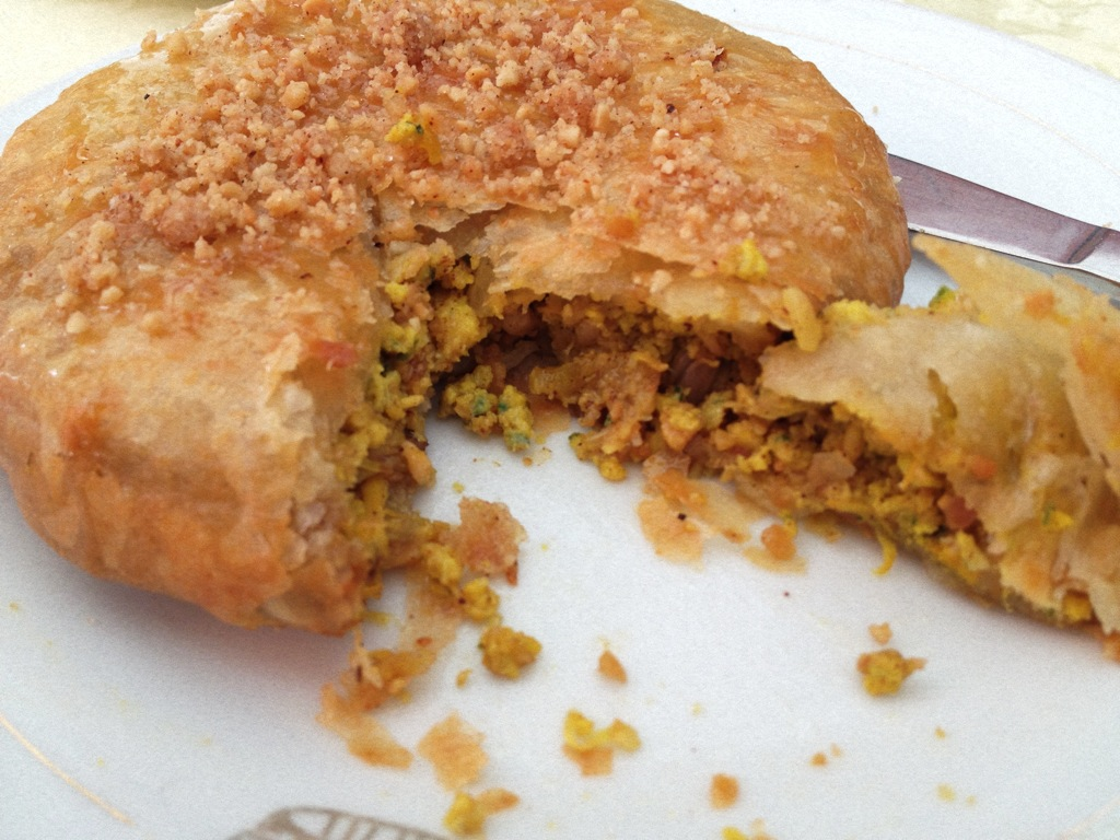 Chicken pastilla